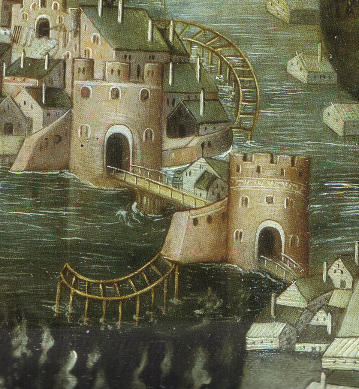 Detail from Vädersolstavlan showing present-day Slussen.